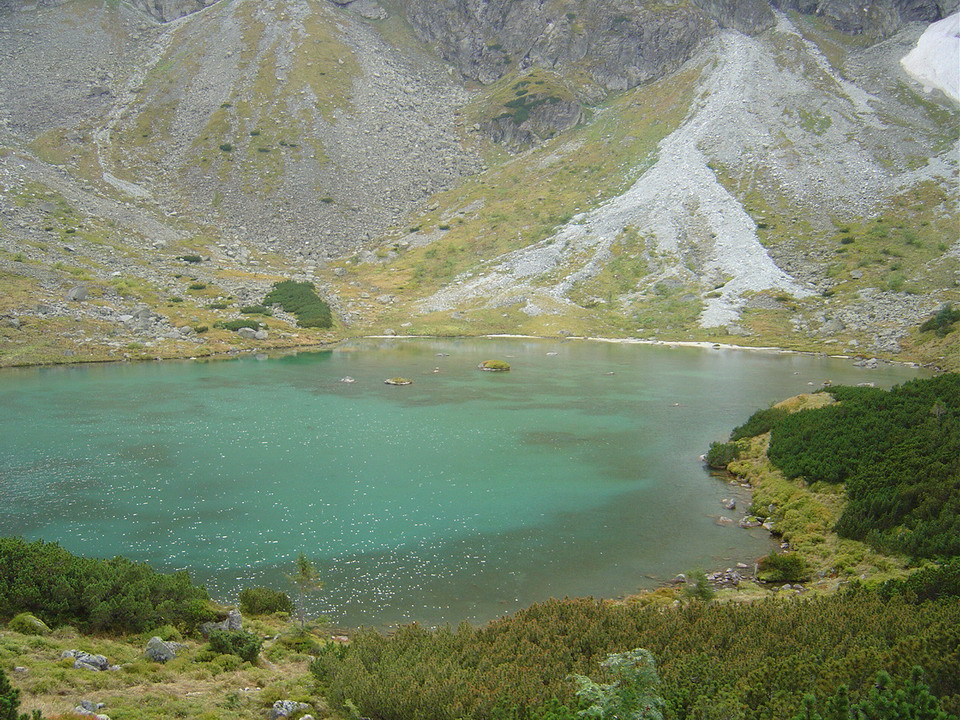 Zelene pleso Kacacie in Kacacia dolina